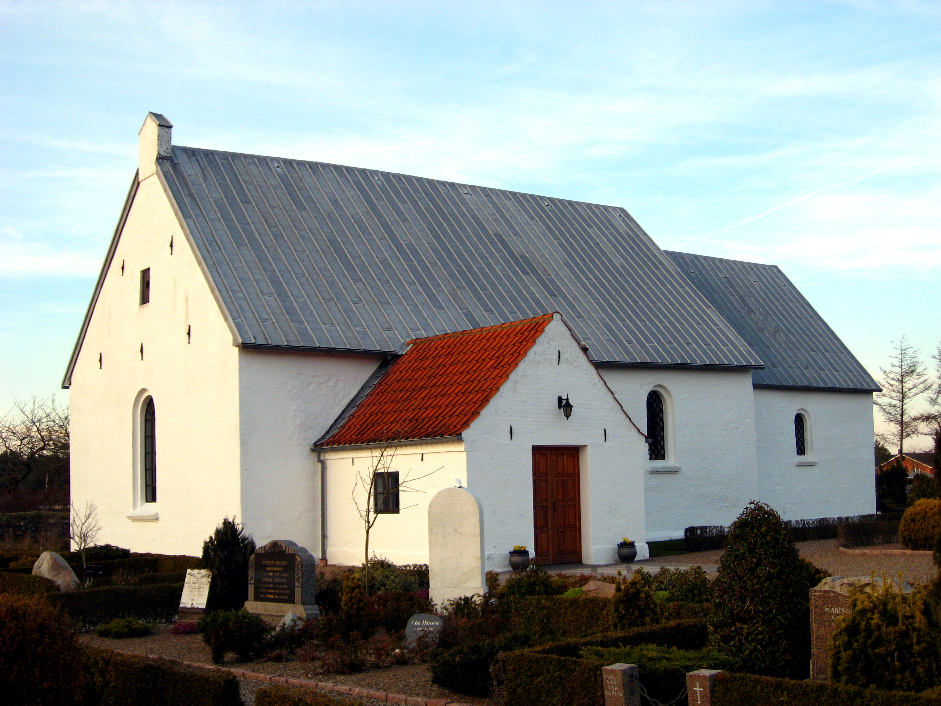 Astrup Kirke, Hjørring Kommune